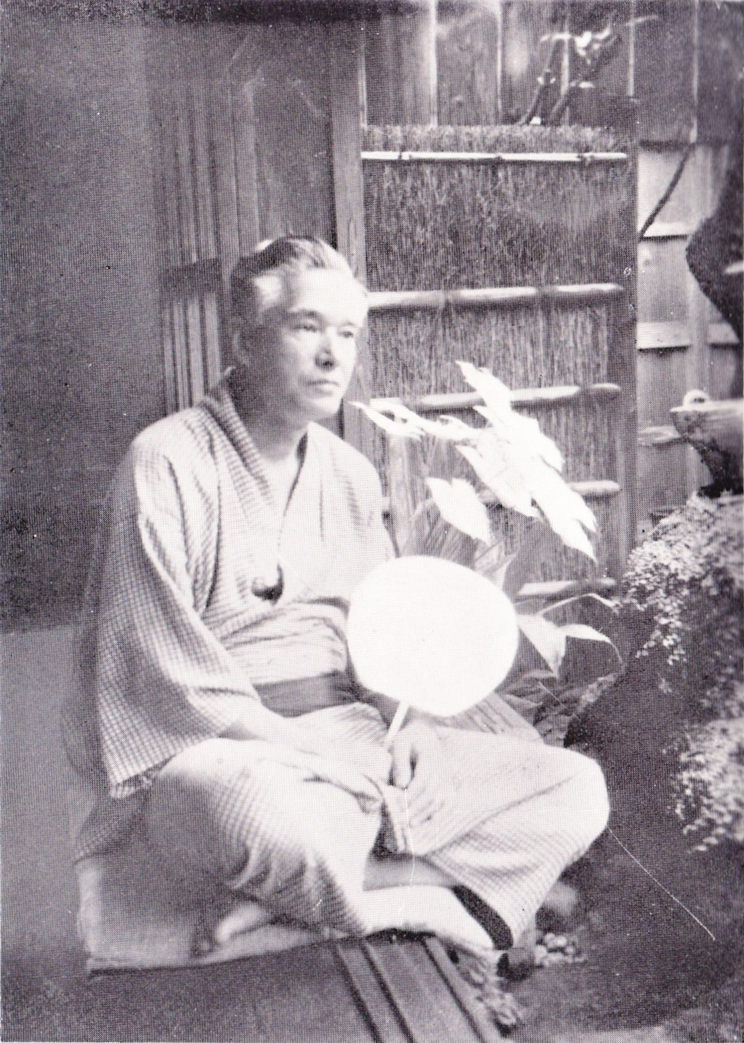 中勘助、赤坂の自邸にて、1935年頃撮影